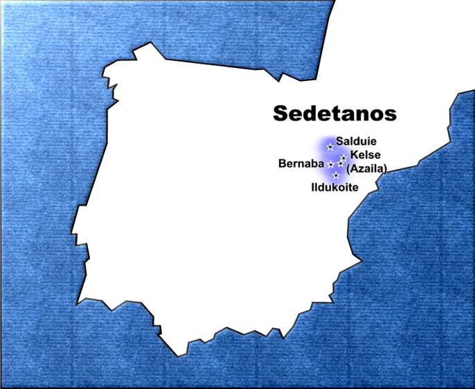 Mapa de distribución de los sedetanos